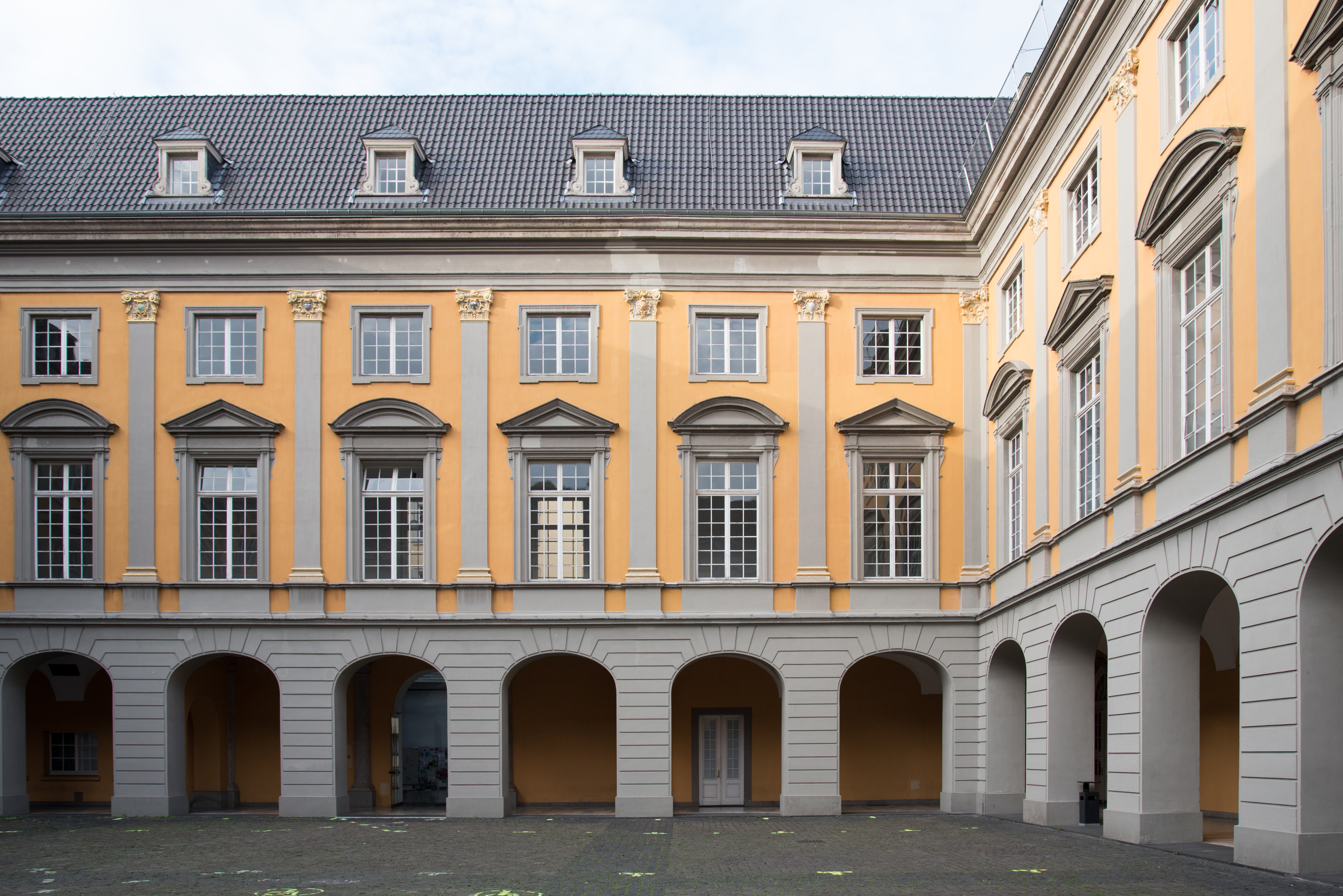 Bonn, Kurfürstliches Schloss